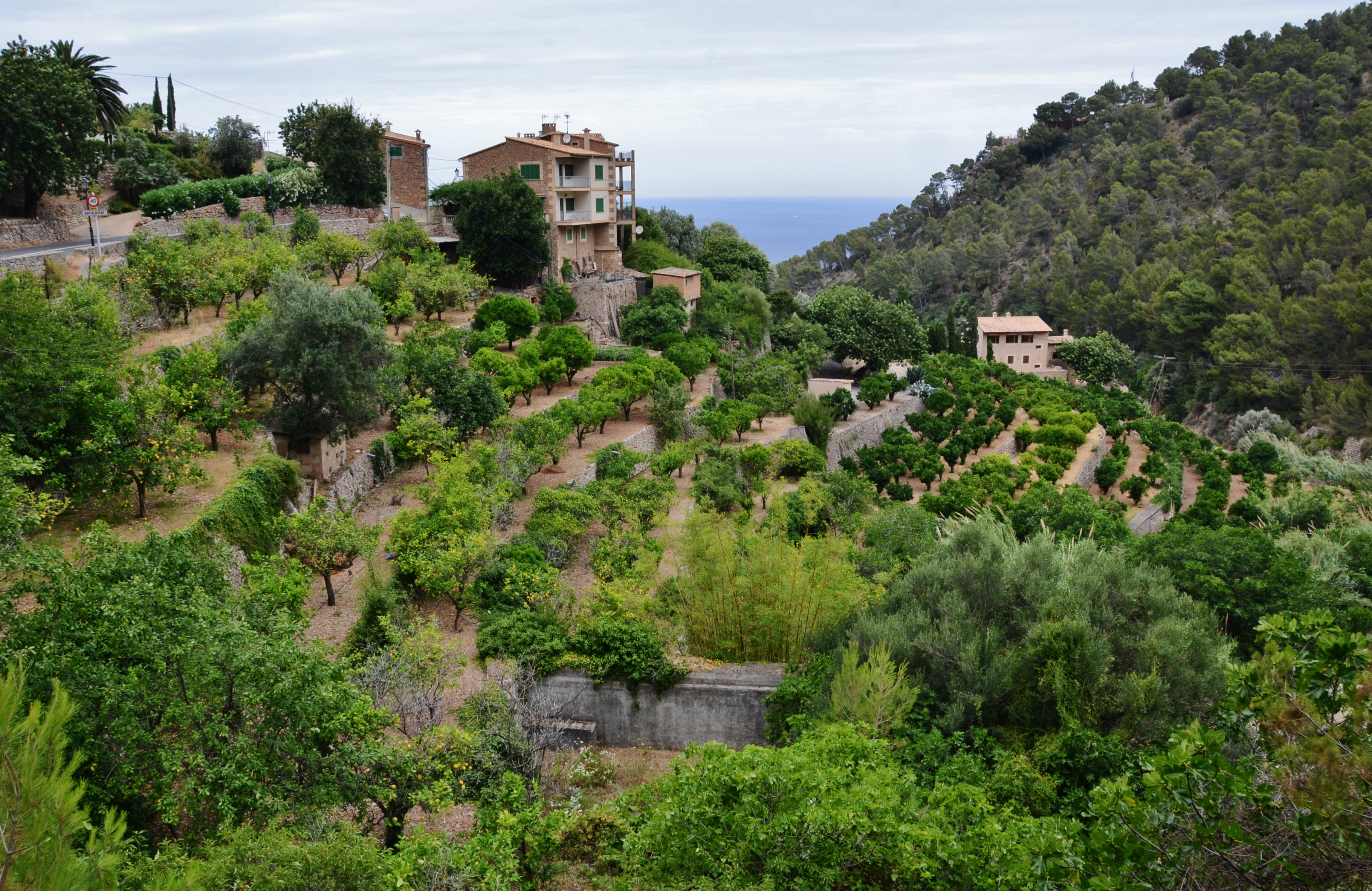 Serra de Tramuntana This is a a photo of a natural area in the Balearic Islands, Spain, with id: ES530036